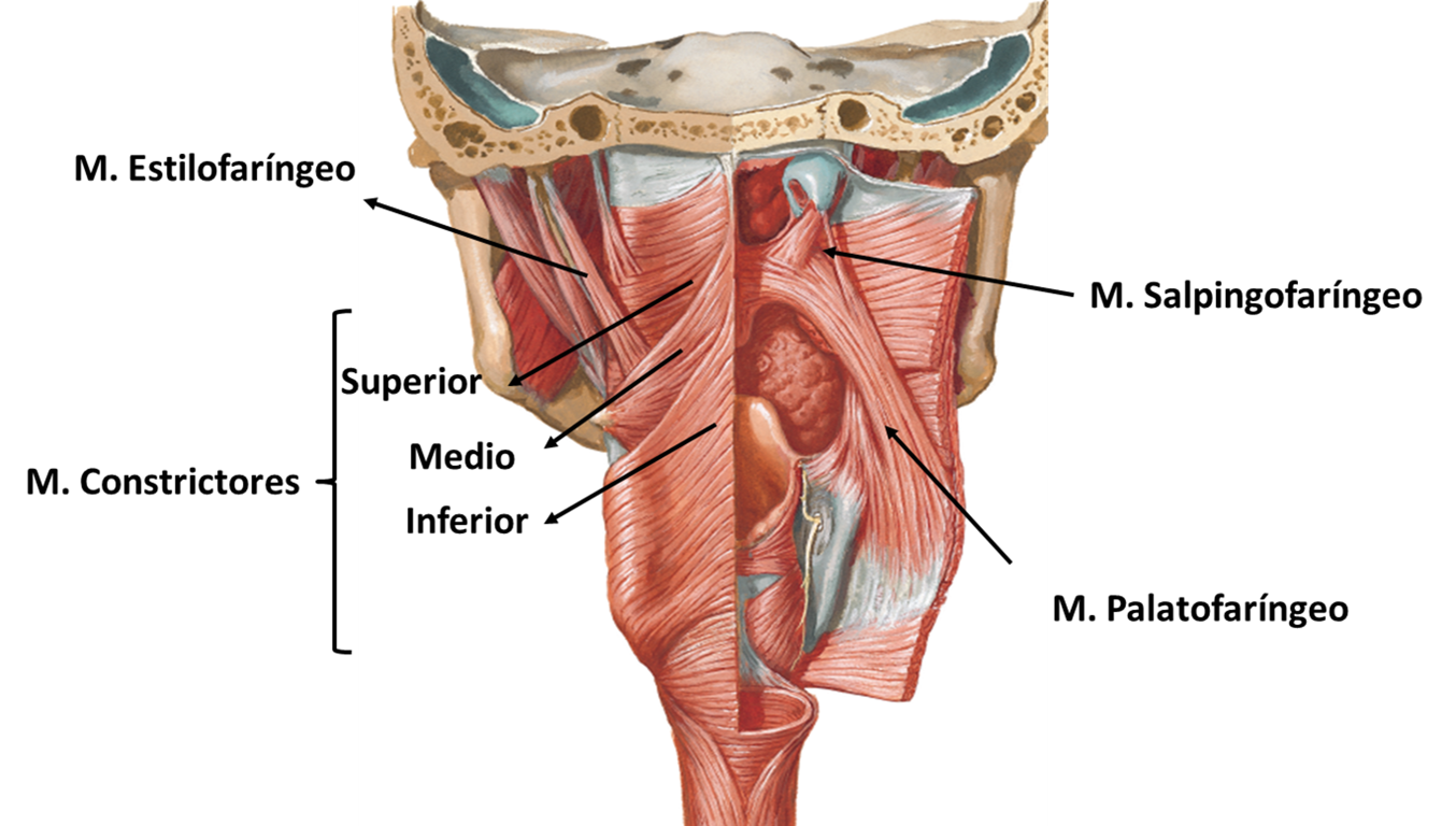 Se identifica el musculo palatofaringeo claramente